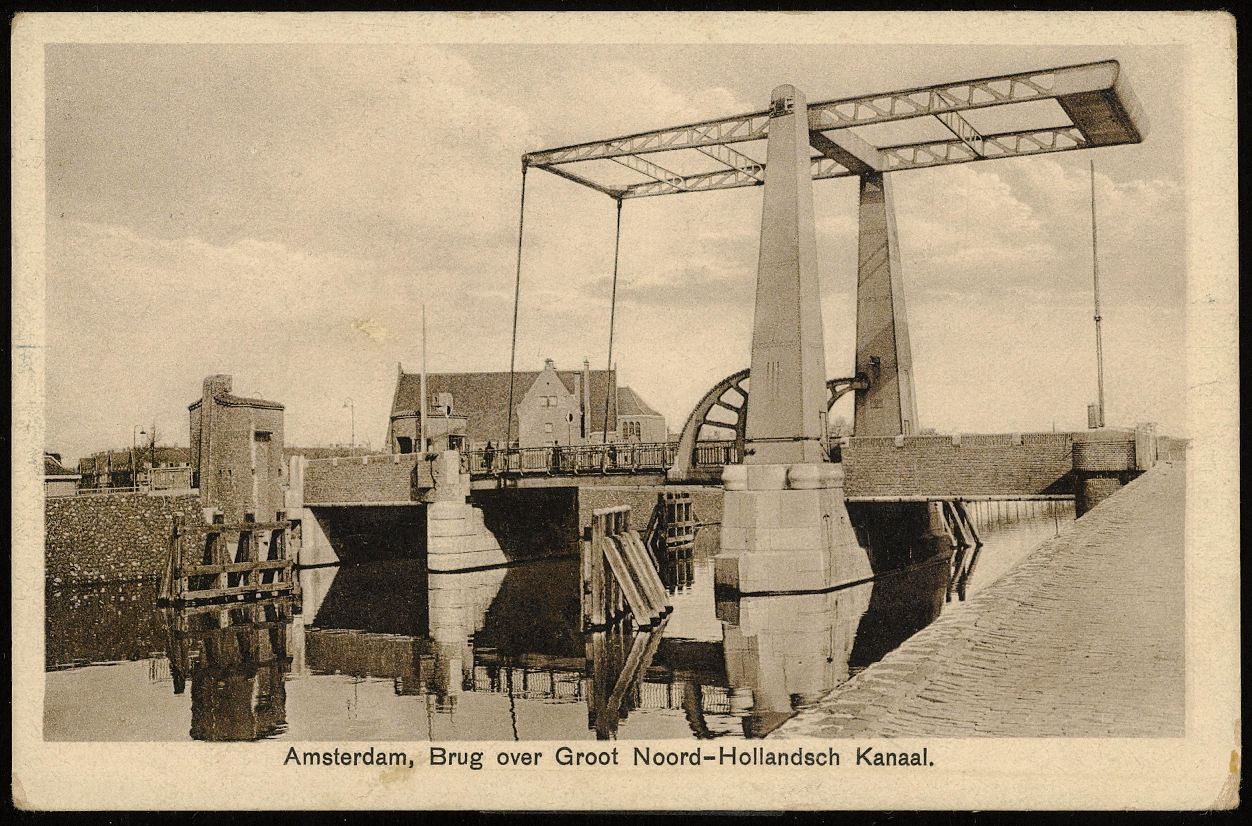 Beschrijving Noordhollandsch Kanaal met brug 357 (Gerben Wagenaarbrug) gezien vanaf de Adelaarsweg Documenttype prentbriefkaart Vervaardiger Onbekend Anoniem Collectie Collectie Stadsarchief Amsterdam: prentbriefkaarten Datering 1929 Geografische naam Noordhollandsch Kanaal Inventarissen Afbeeldingsbestand PRKBB00428000001